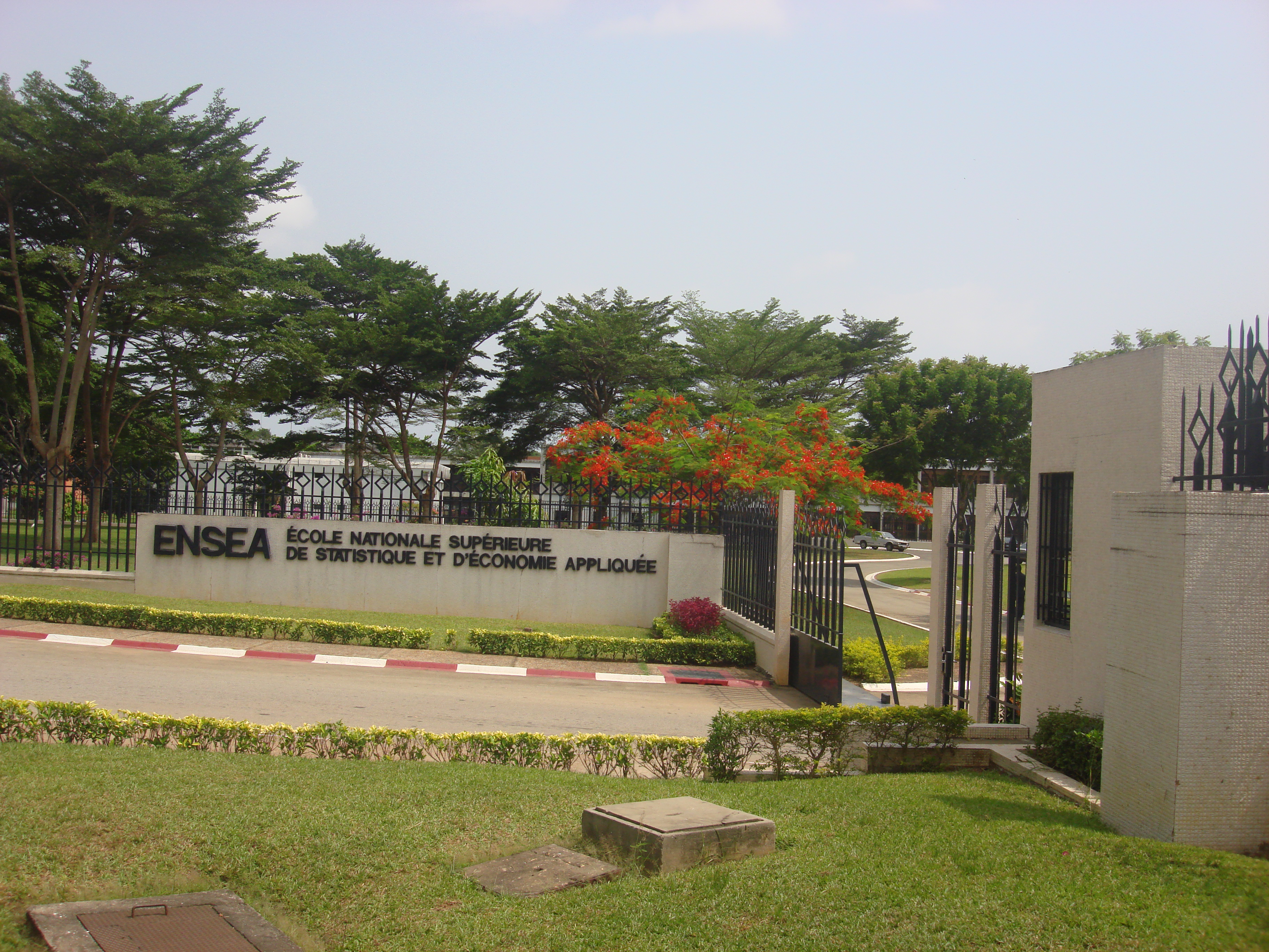 Ecole nationale de statistique et d'économie appliquée de Côte d'Ivoire